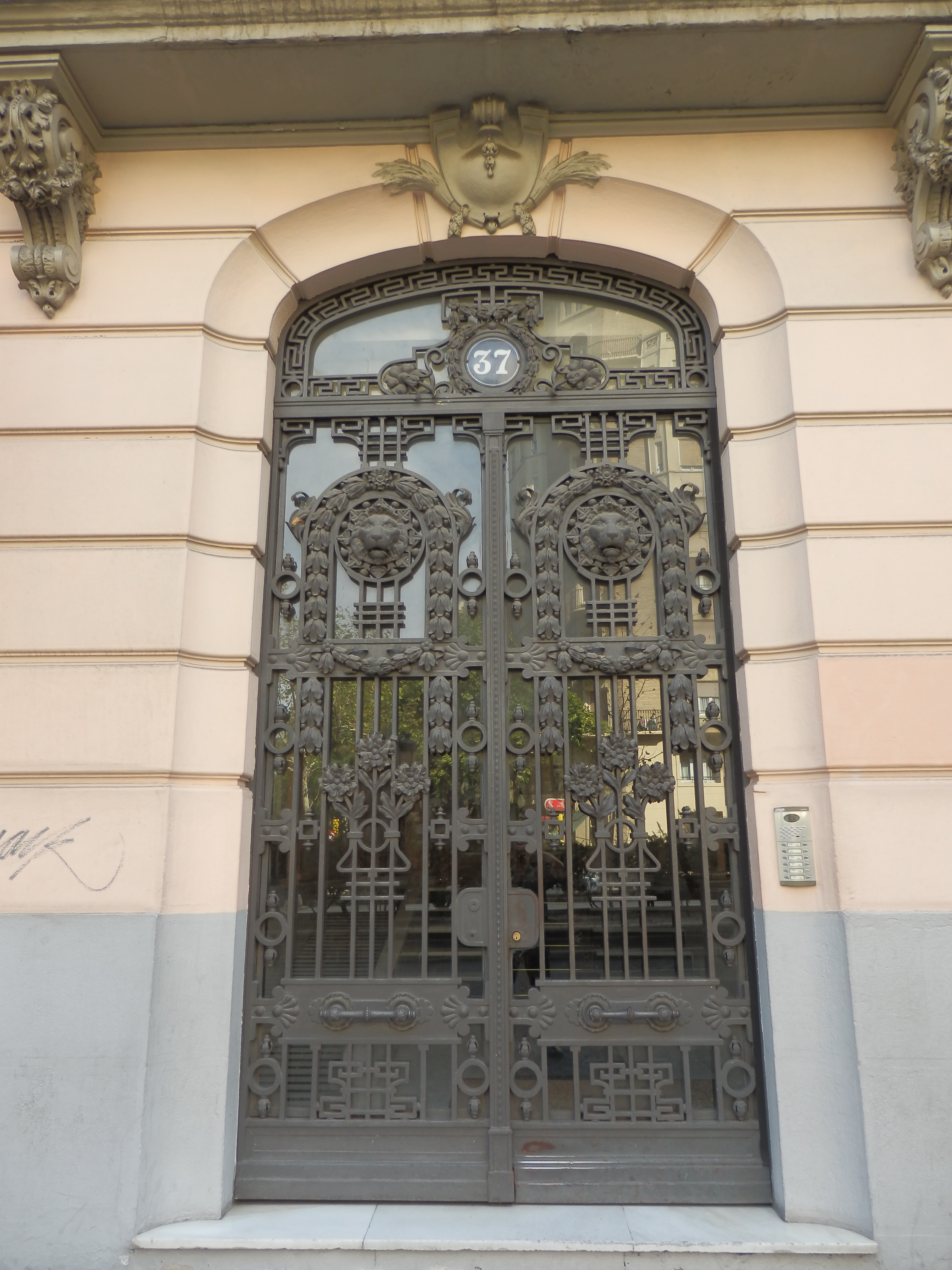 Edificio de viviendas en el Paseo de Sagasta, 37, de Zaragoza, España. Es bien de interés cultural (BIC) de la provincia de Zaragoza.